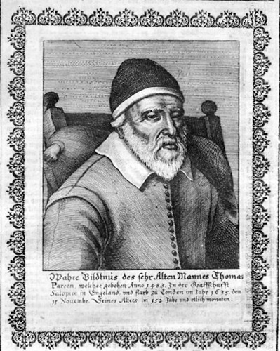 Thomas Parr aus England, einer der ältesten Menschen die es gab.